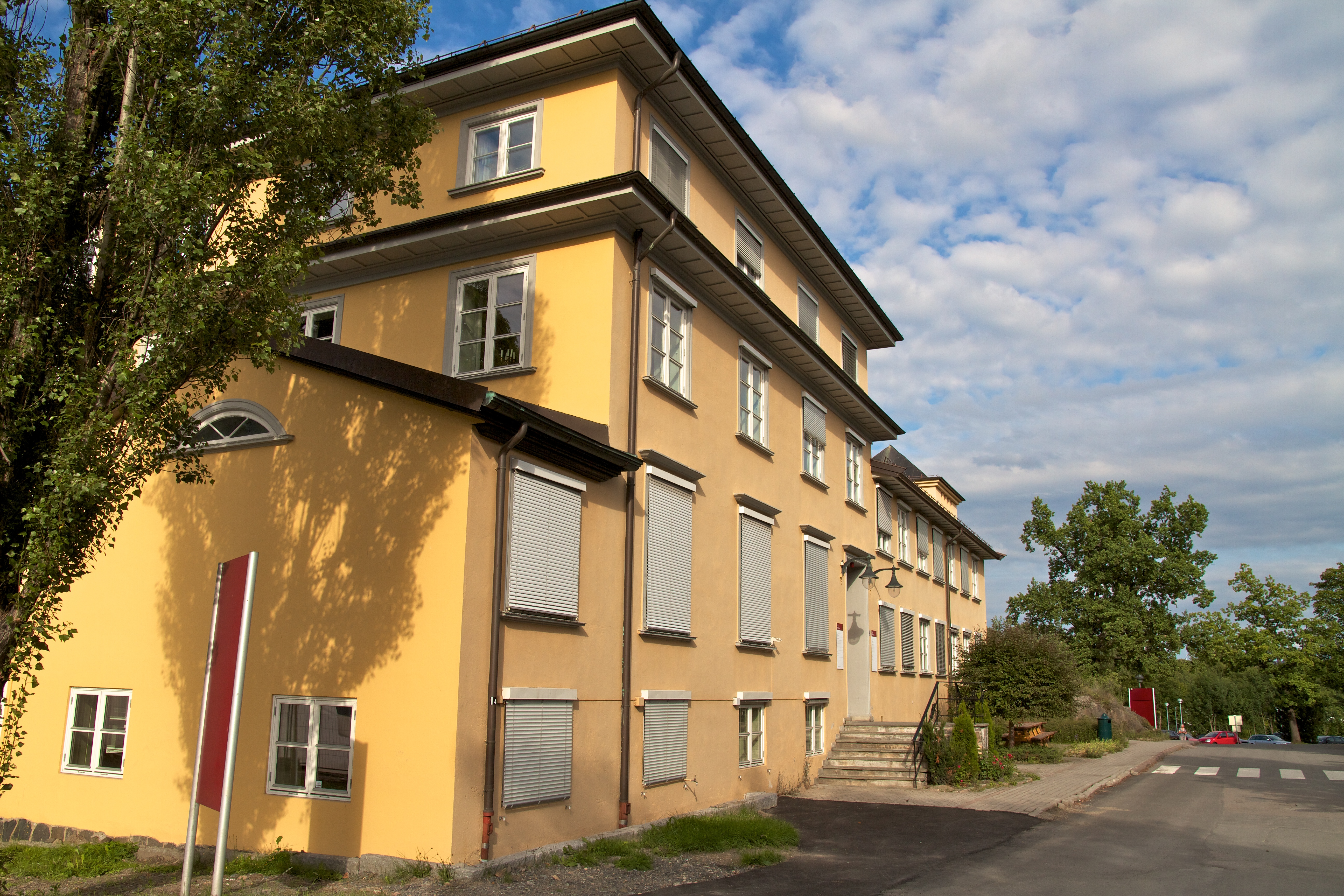 Diakonhjemmet, Oslo.